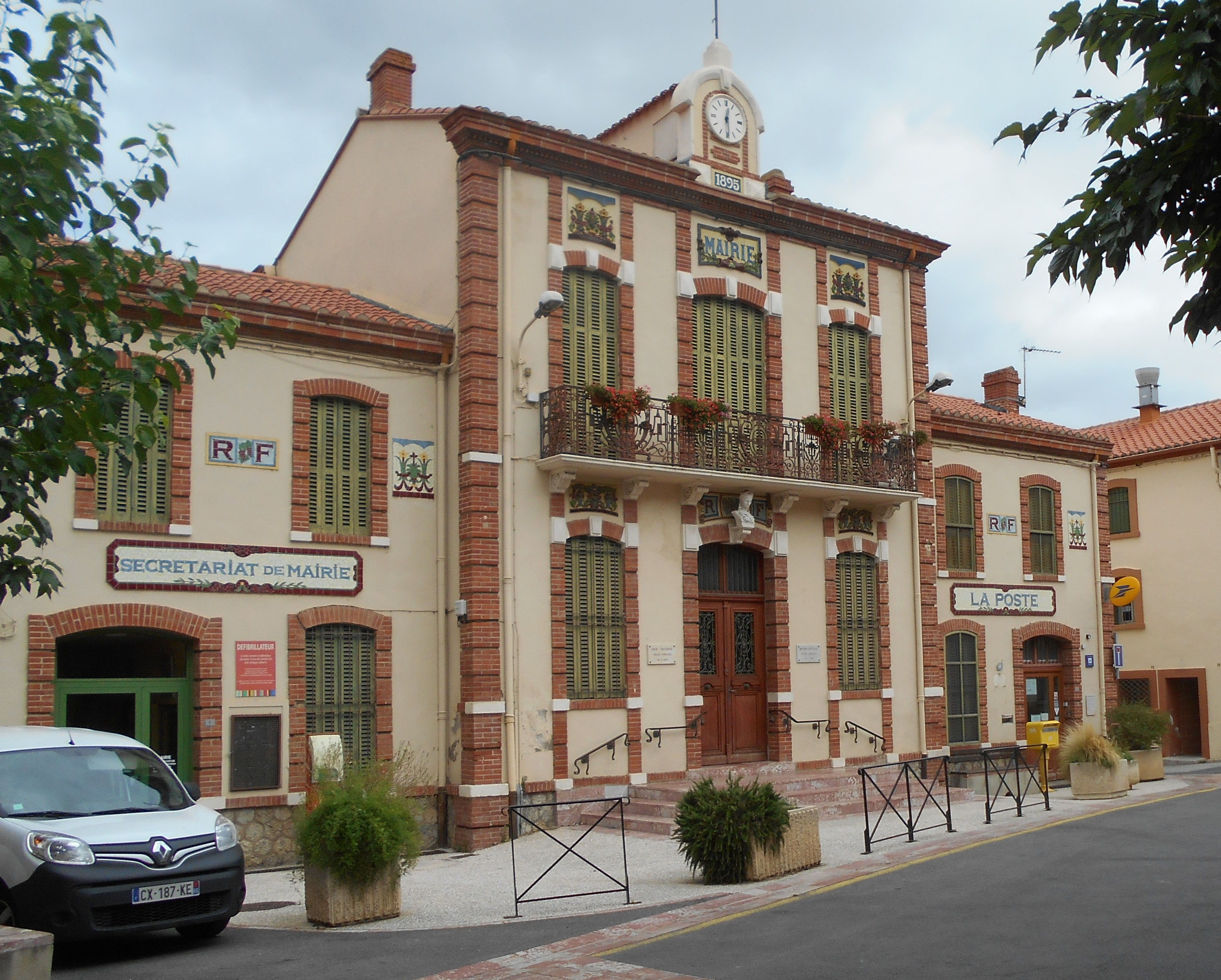 La Casa del Comú de Talteüll